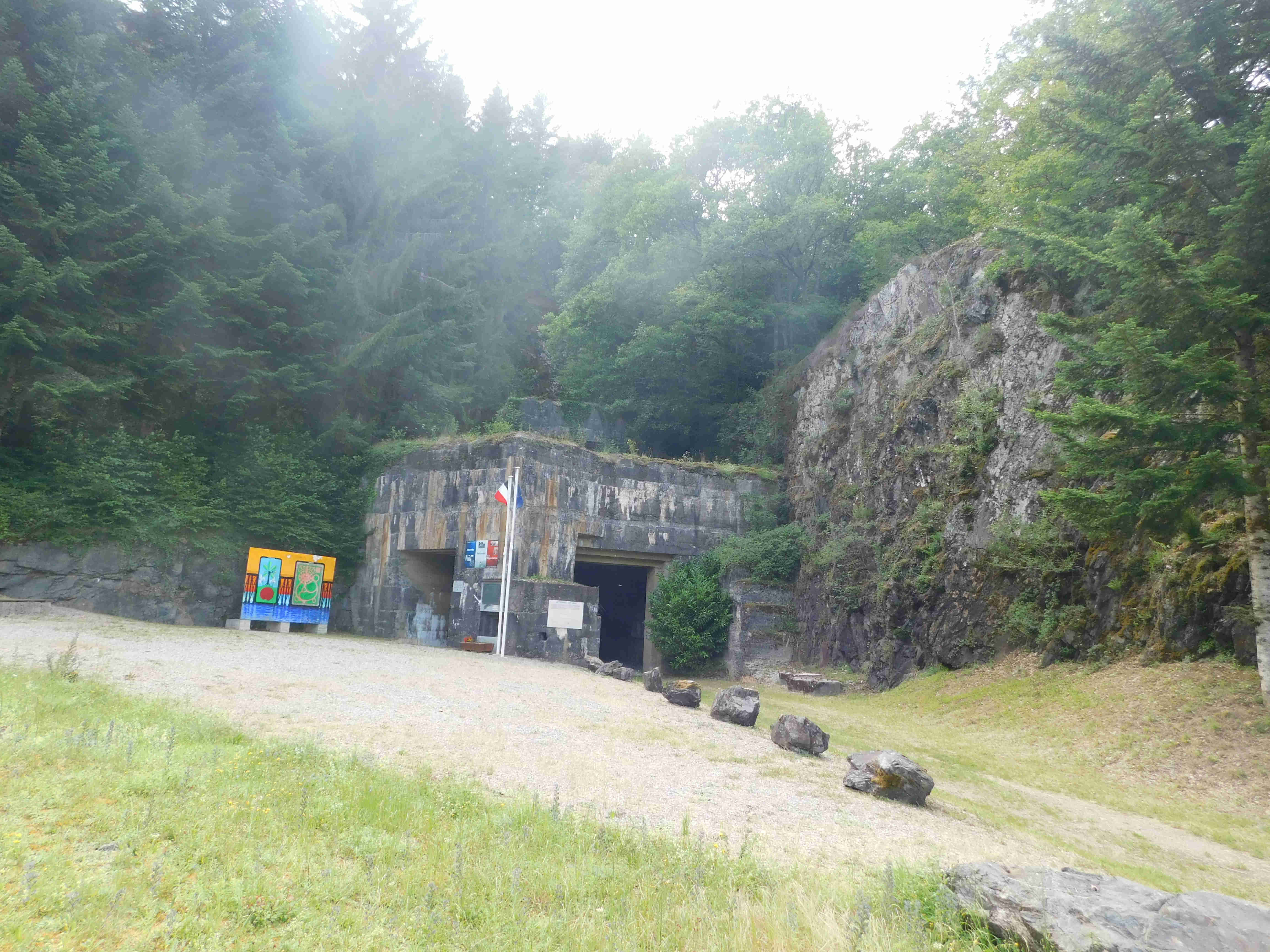 Annexe Struthof en 68